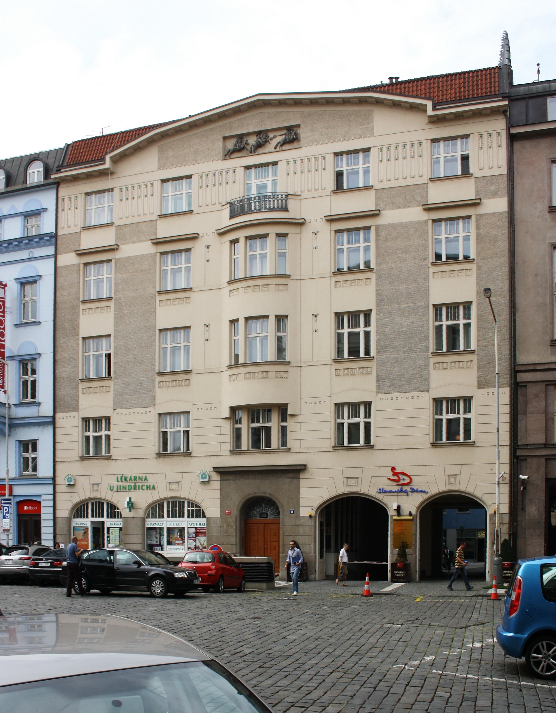 Východní průčelí. Dum U tří jezdců, raha-Nové Město, Senovážné náměstí 869/28.